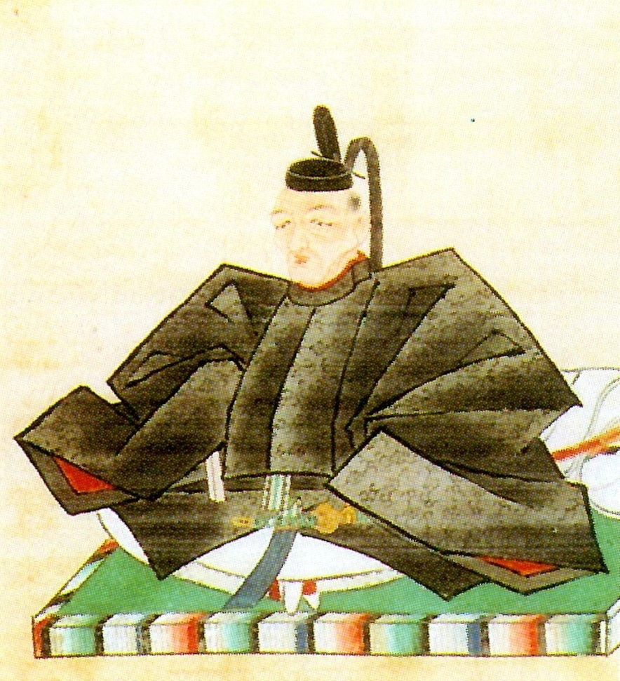 佐竹義処の肖像。